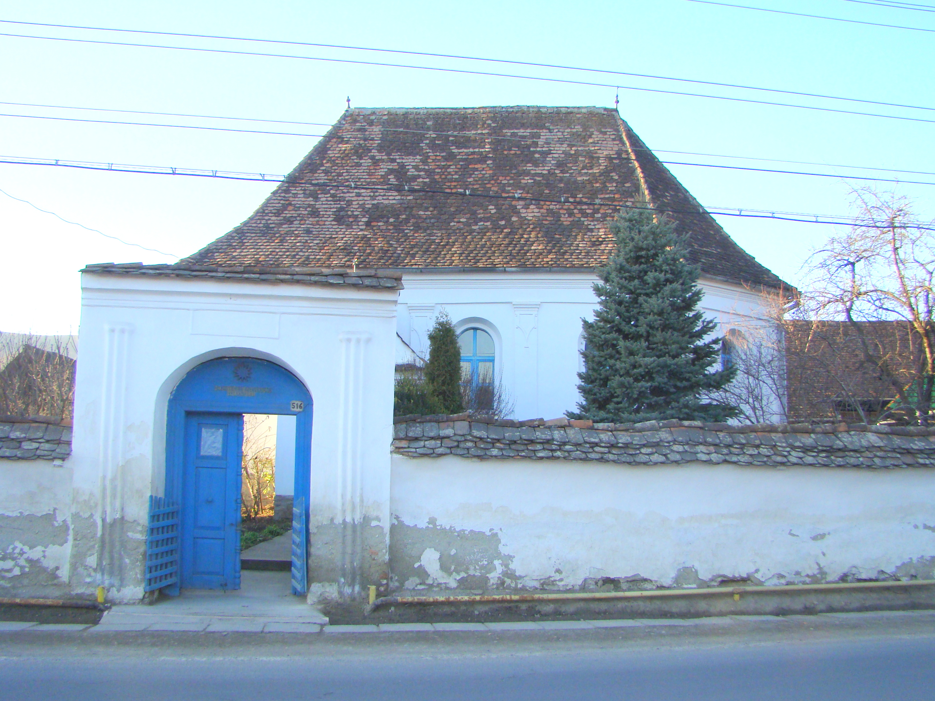 Biserica reformată din Trei Sate (fostul sat Cioc), comuna Ghindari, judeţul Mureş